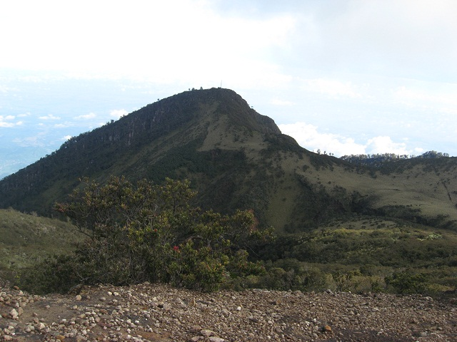 Sudut Lain dari Gunung Lawu, Puncak Hargo Dalem